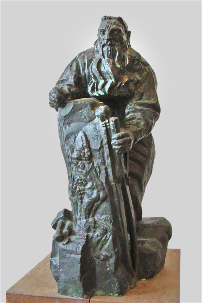 Rodin travaillant à sa Porte de l'Enfer Rodin working at his Gate of Hell 1910 Auguste Rodin (1840-1917) Bronze, fonte Georges Rudier 1927 Don de Bourdelle au musée Rodin S.1214 Le site du musée Rodin a enfin été rénové !